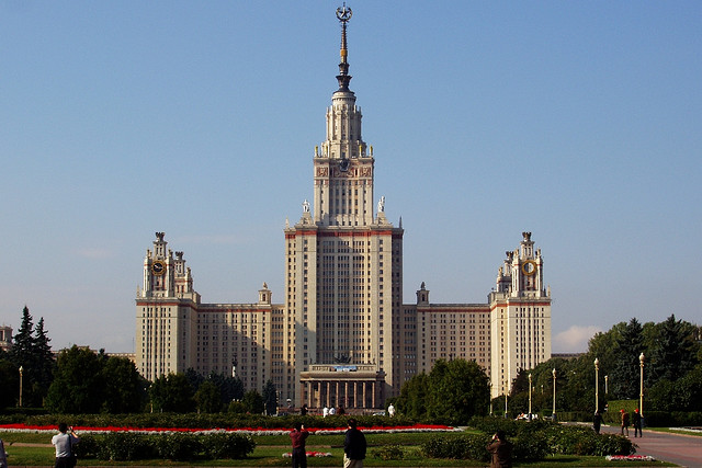 Московский государственный университет (МГУ) Moscow, Russia. August 2005